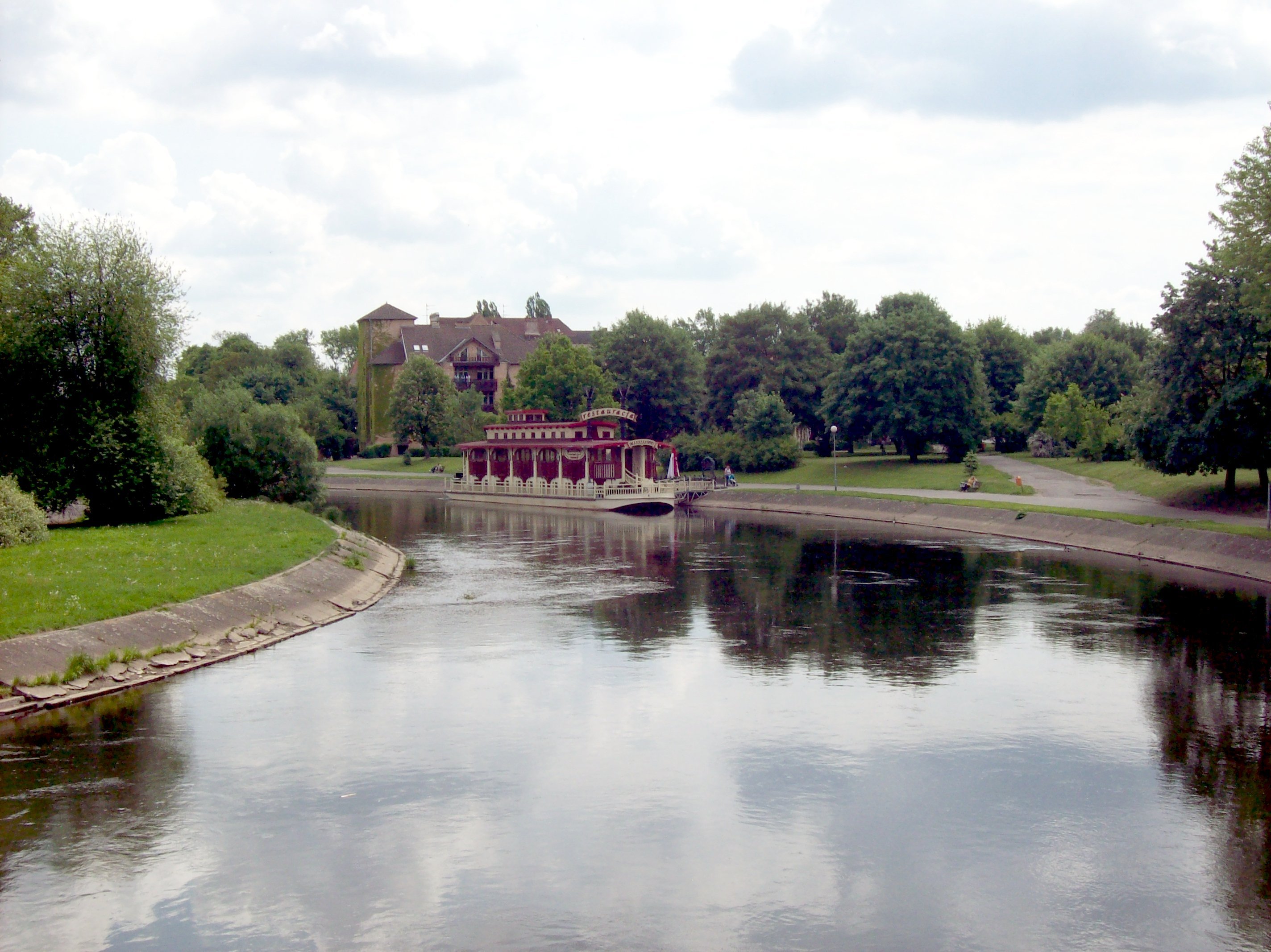 Rzeka Gwda przepływająca przez Piłę.